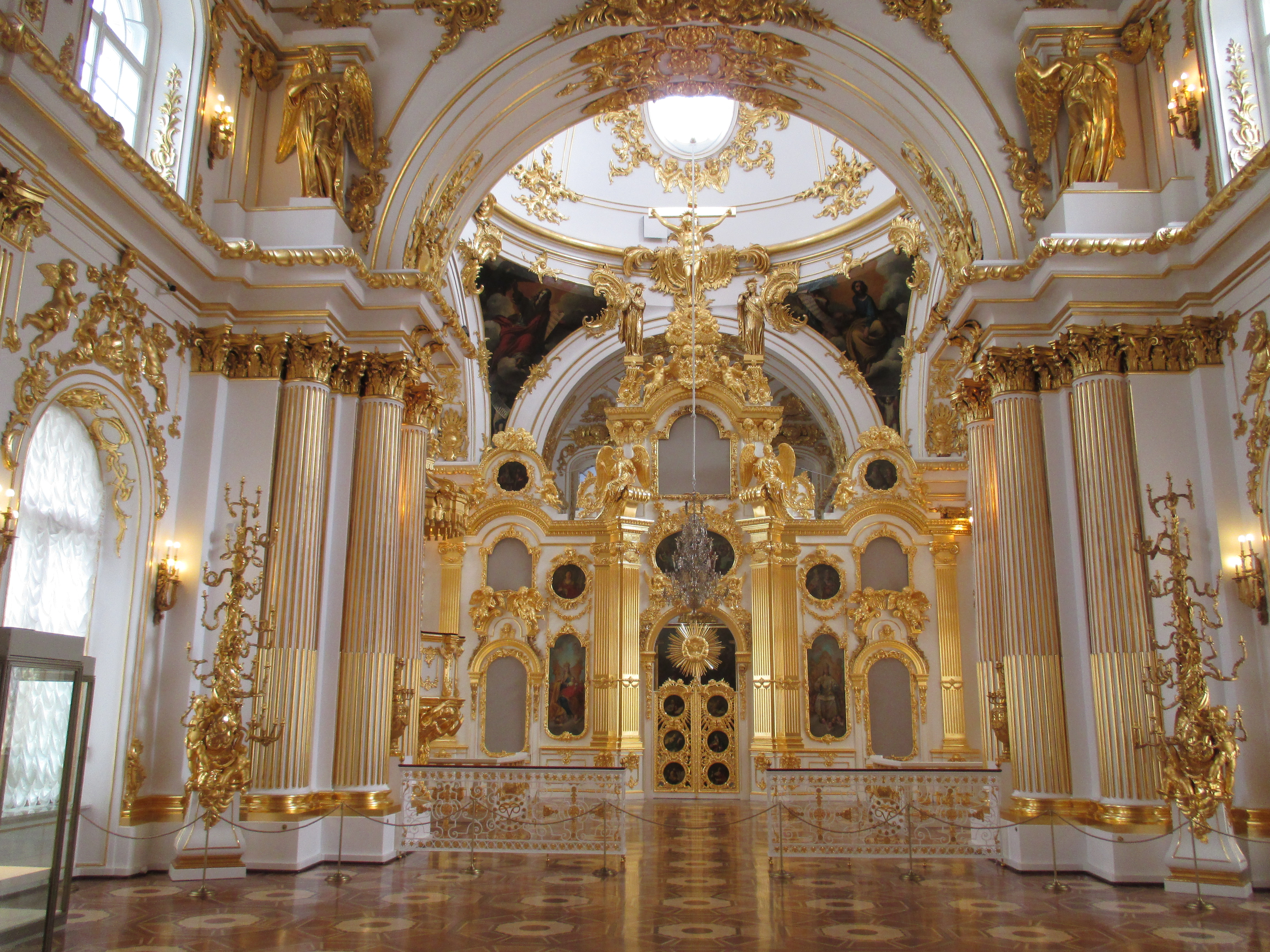 Cобор Спаса Нерукотворного Образа в Зимнем дворце